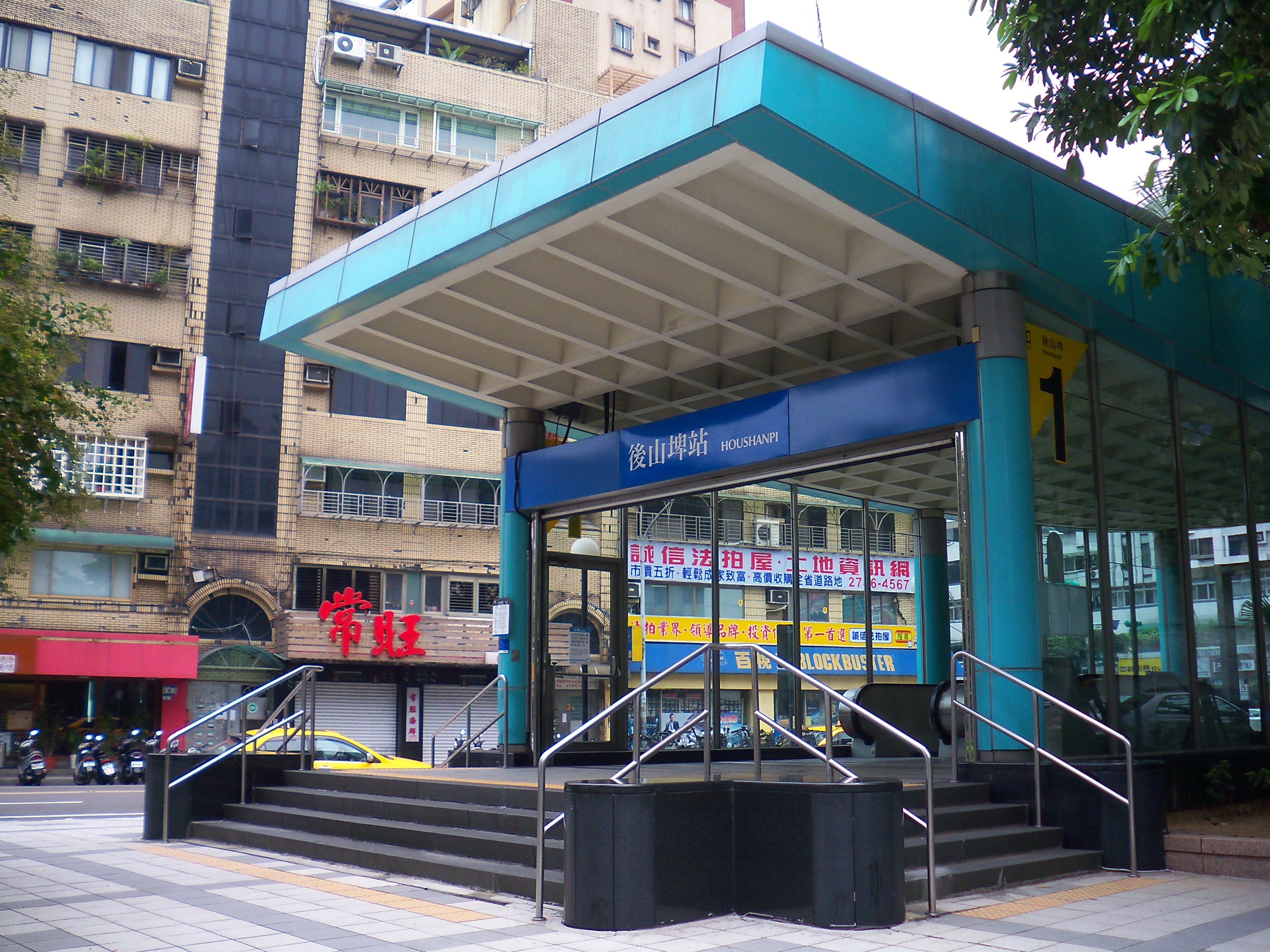 台北捷運南港線後山埤駅1号出口。